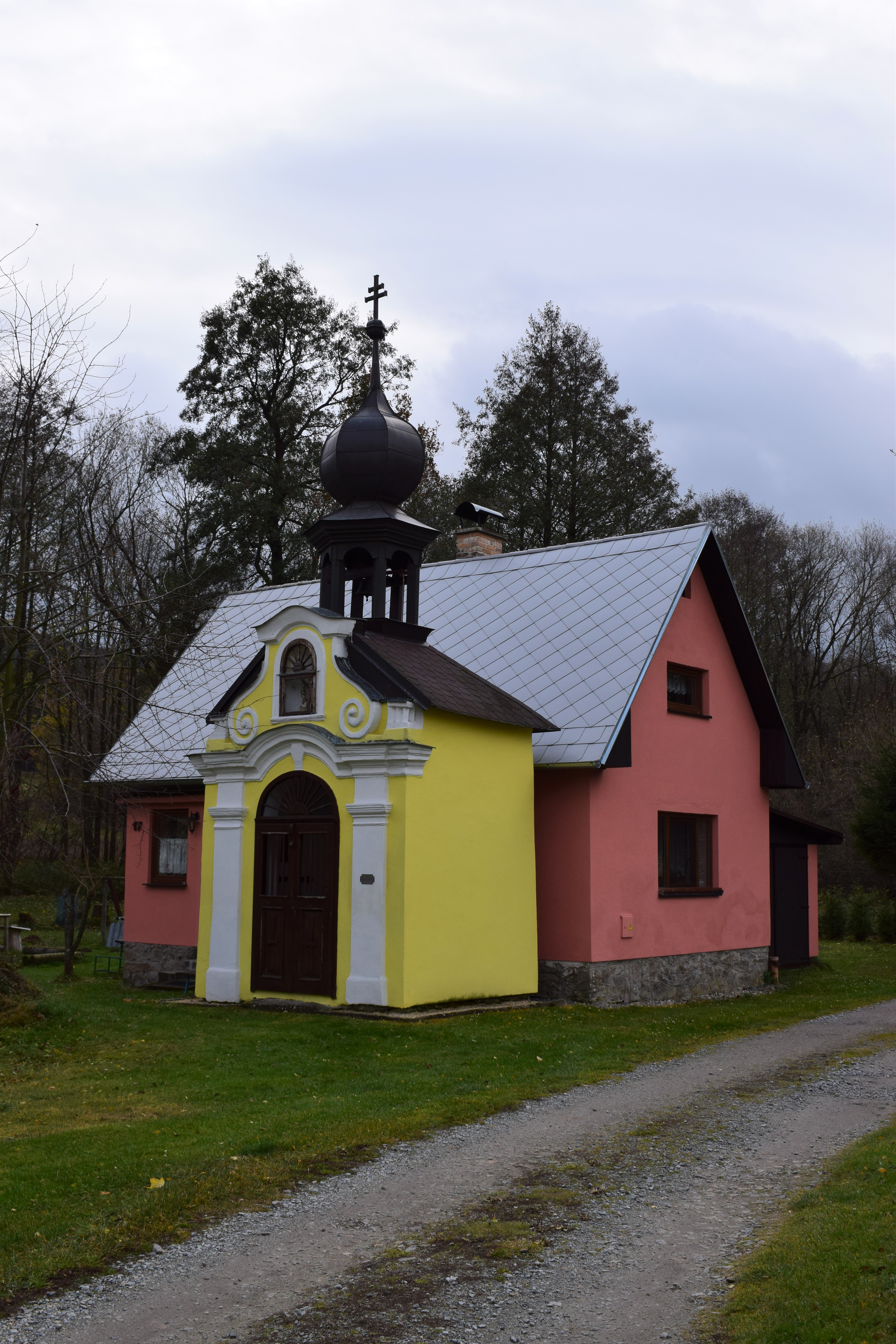 Kaple v Chlupaté Vsi